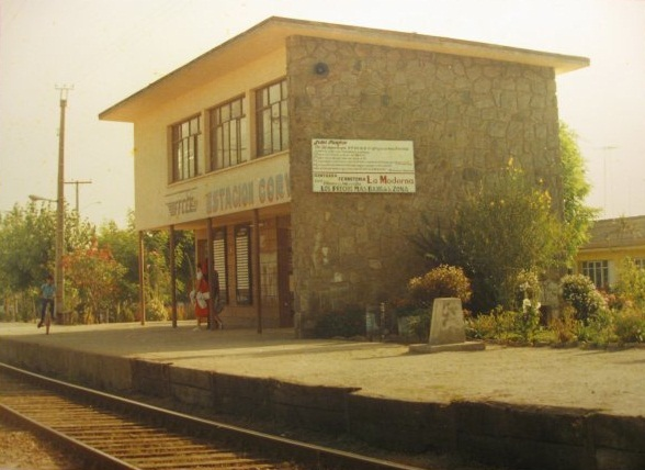 Estación Corvi hacia 1980, ubicada en Quillota.